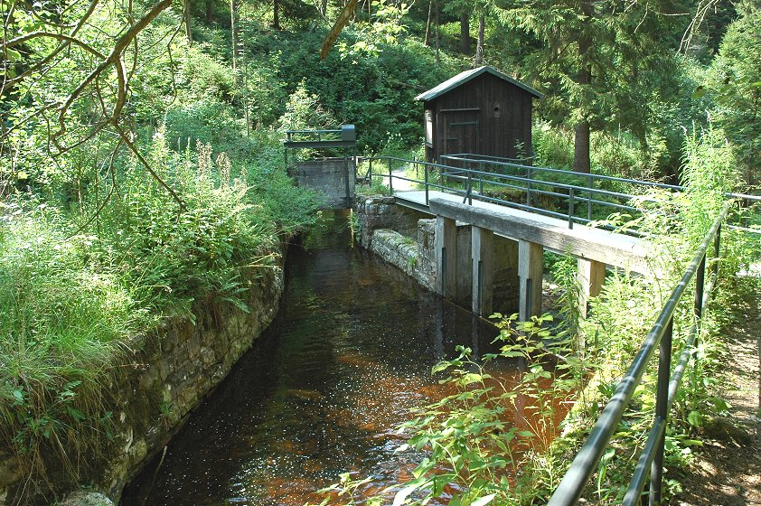 Regulierungseinrichtung am Dammgraben bei Altenau, Bauwerk des Oberharzer Wasseregals